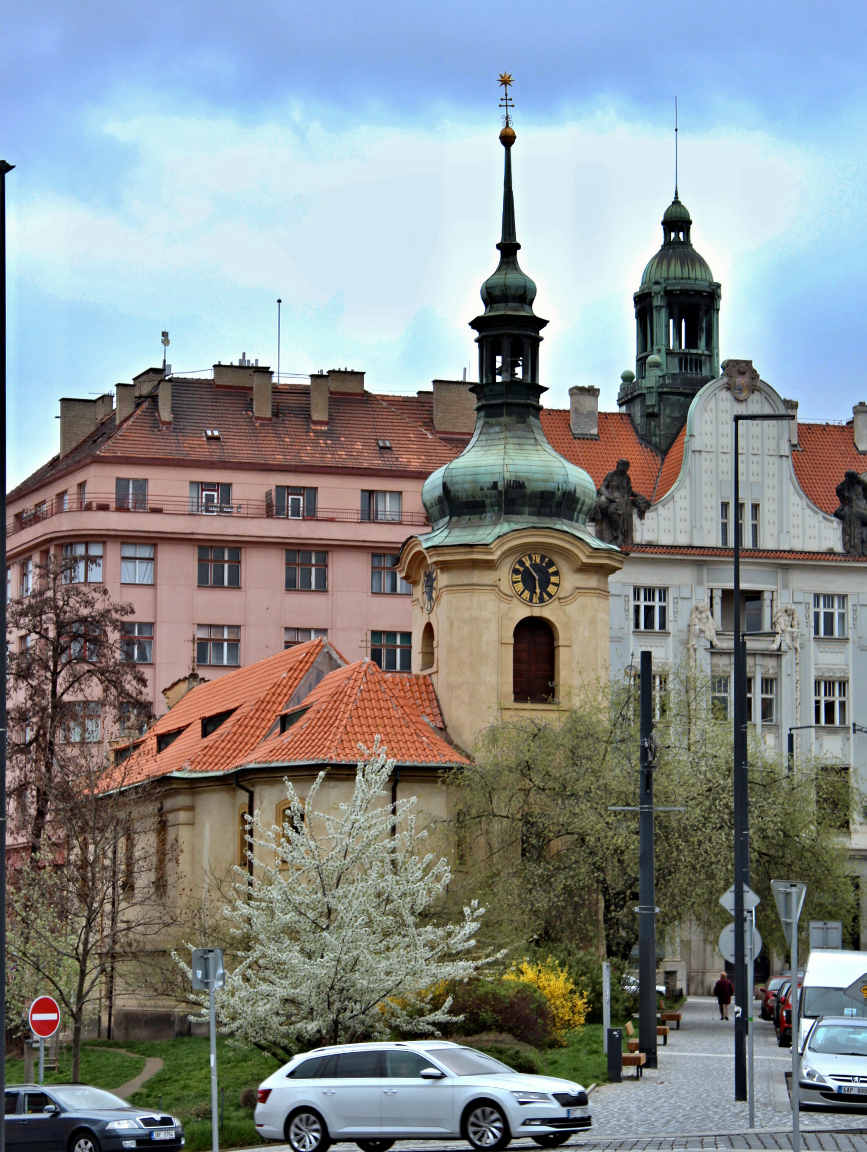 Kostel sv. Mikuláše v Praze 10-Vršovicích